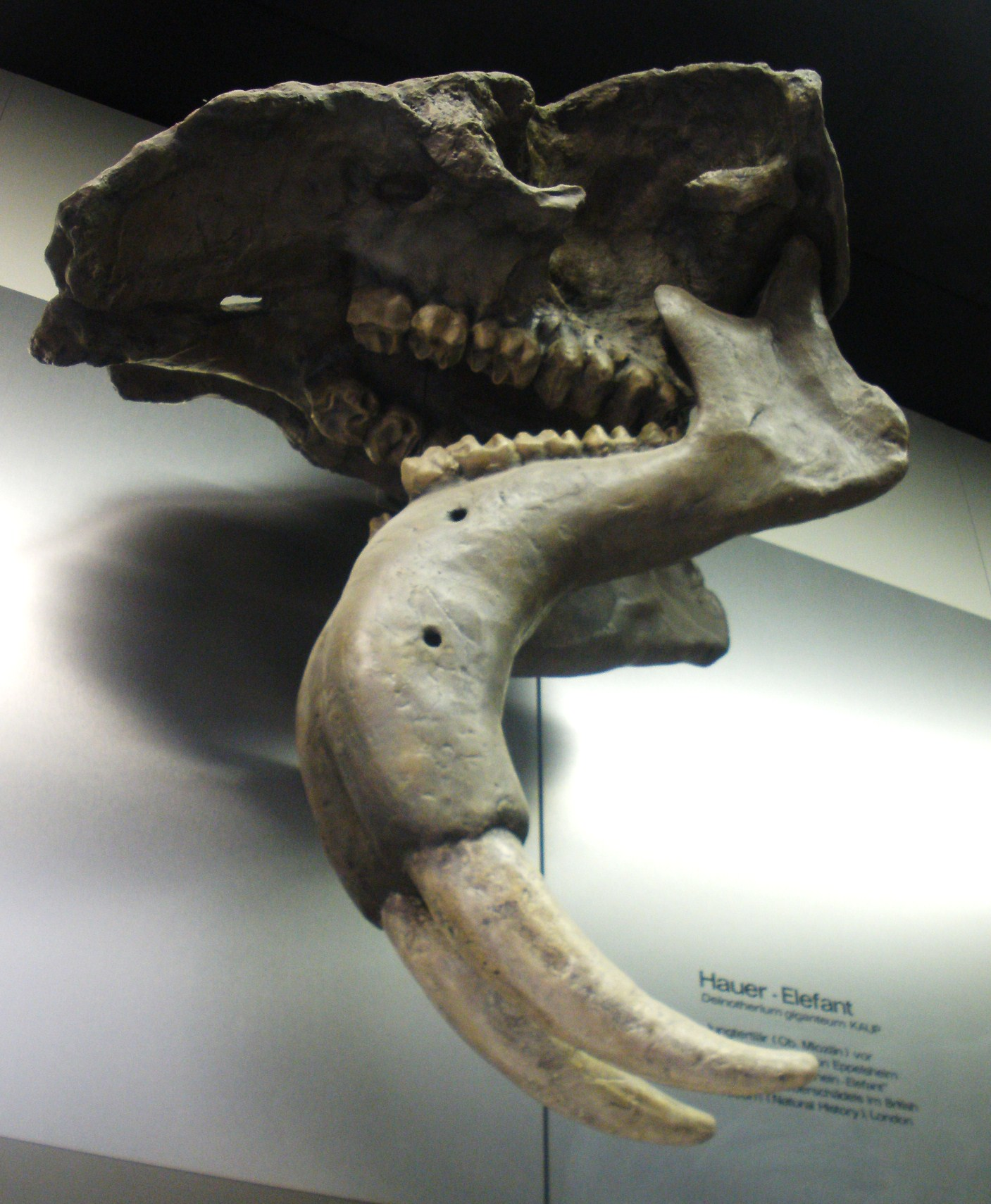 Fossil of Deinotherium, an extinct proboscidean- Took the photo at Senckenberg Museum of Frankfurt